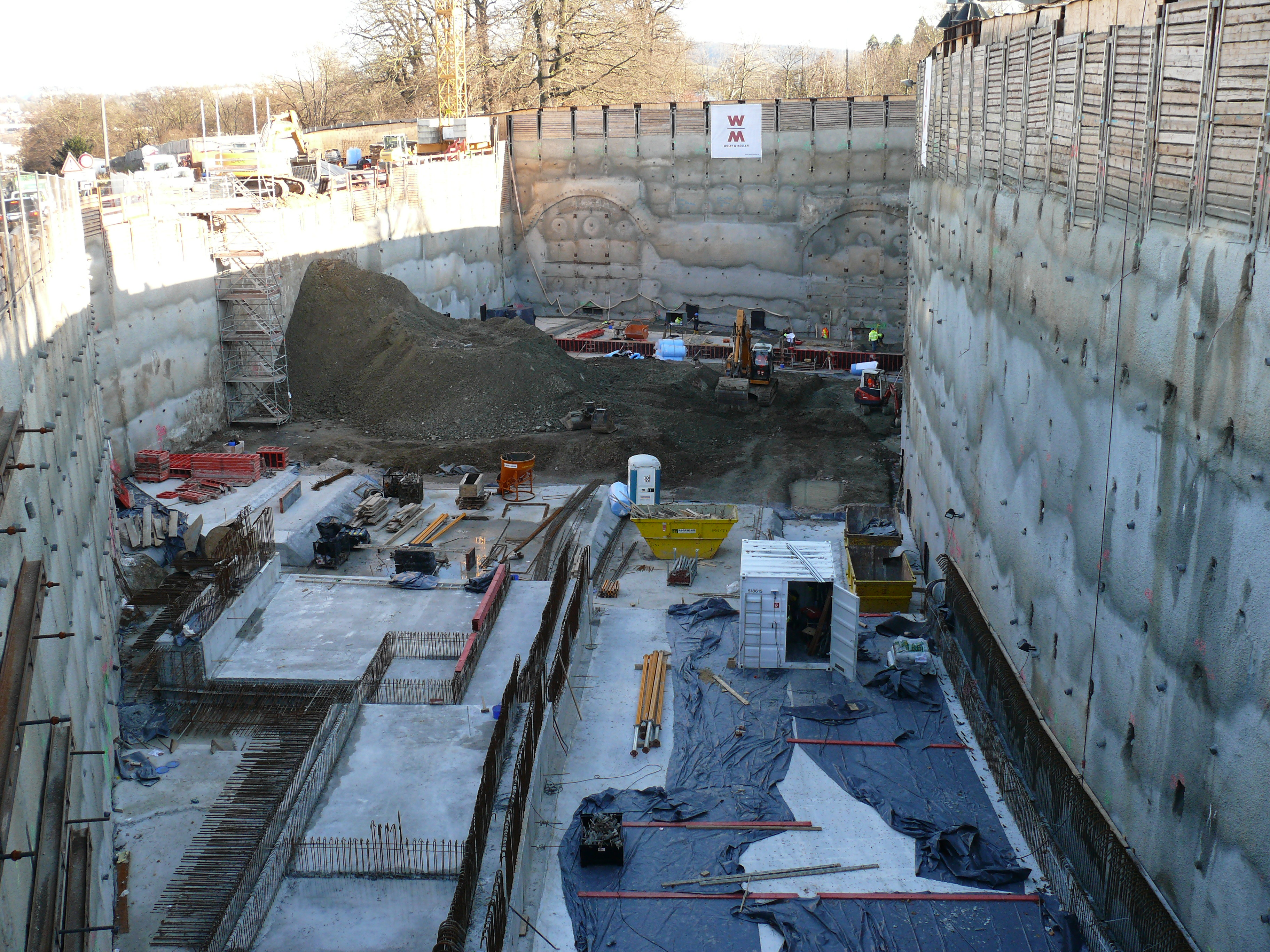 Blick auf das Westportal des Rosensteintunnels (B10) in Stuttgart, im Januar 2015.